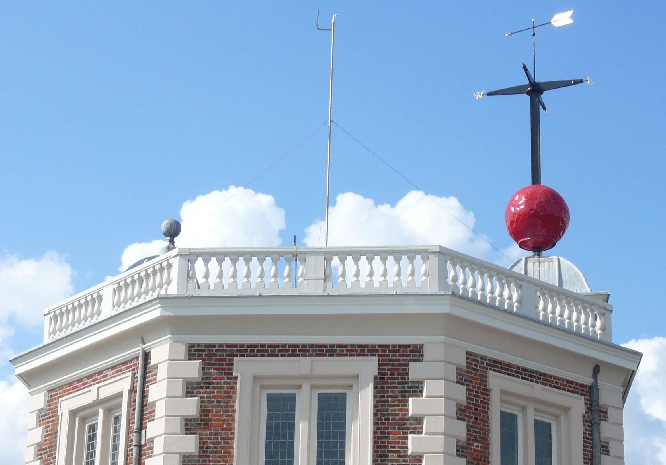 The timeball at Greenwich Observatory, London, UK